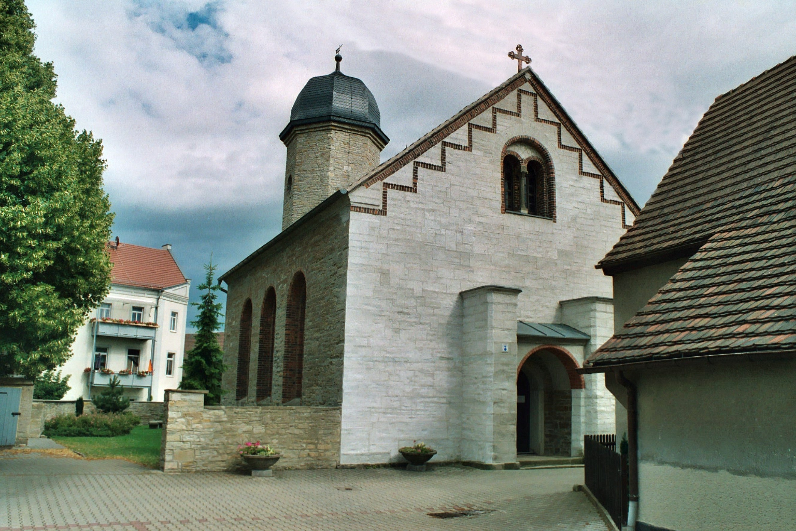 Geußnitzer Dorfkirche, erbaut 1849, im 2.Weltkrieg zerstört und danach wieder aufgebaut; an der Zeitzer Straße, Geußnitz ist Ortsteil von Zeitz